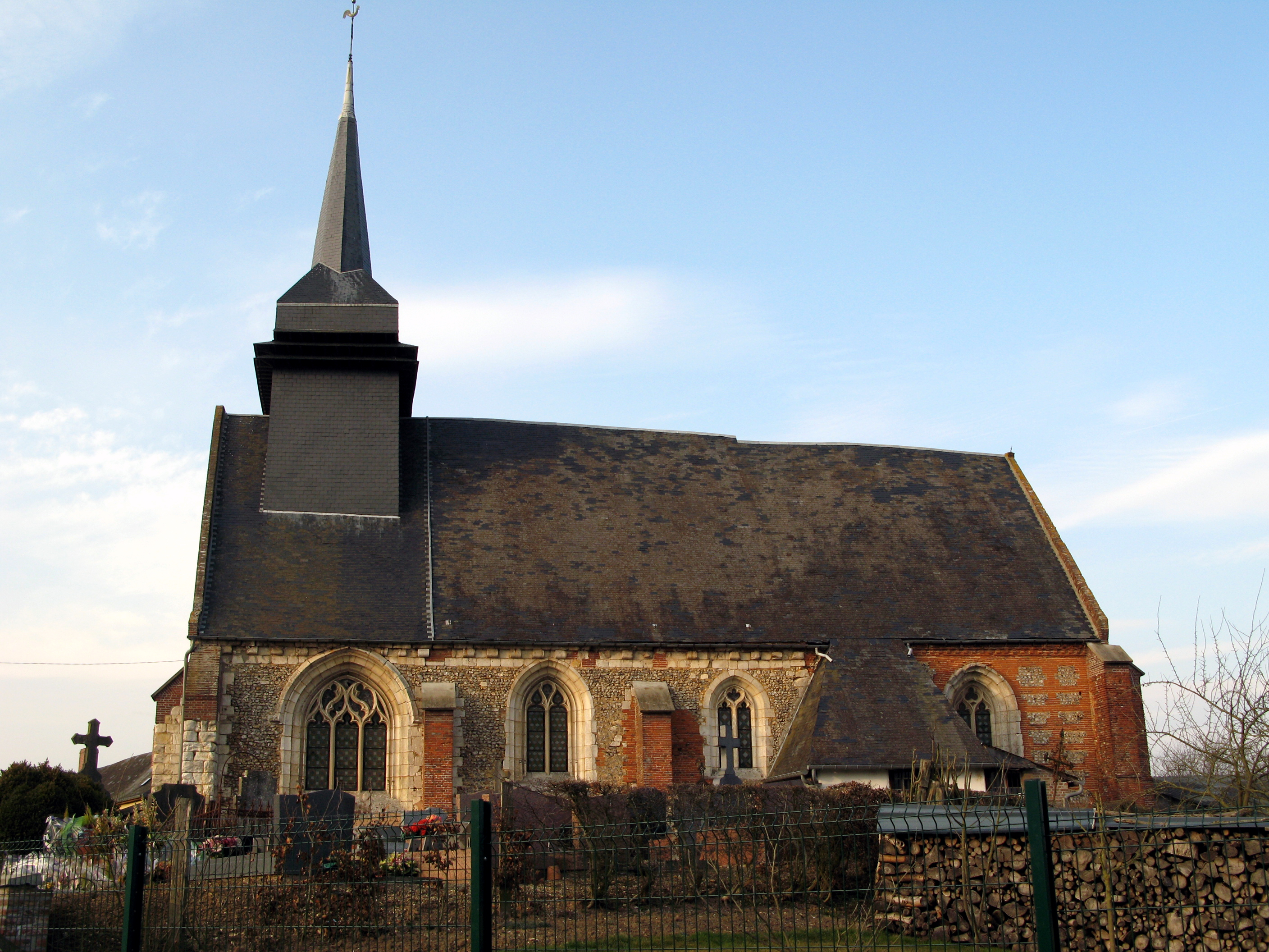 Lafresnoye, localité centrale de Lafresguimont-Saint-Martin (Somme, France) - L'église de Lafresnoye (village faisant partie administrativement de la commune de Lafresguimont-Saint-Martin) est bâtie en pierre, brique et silex. . .